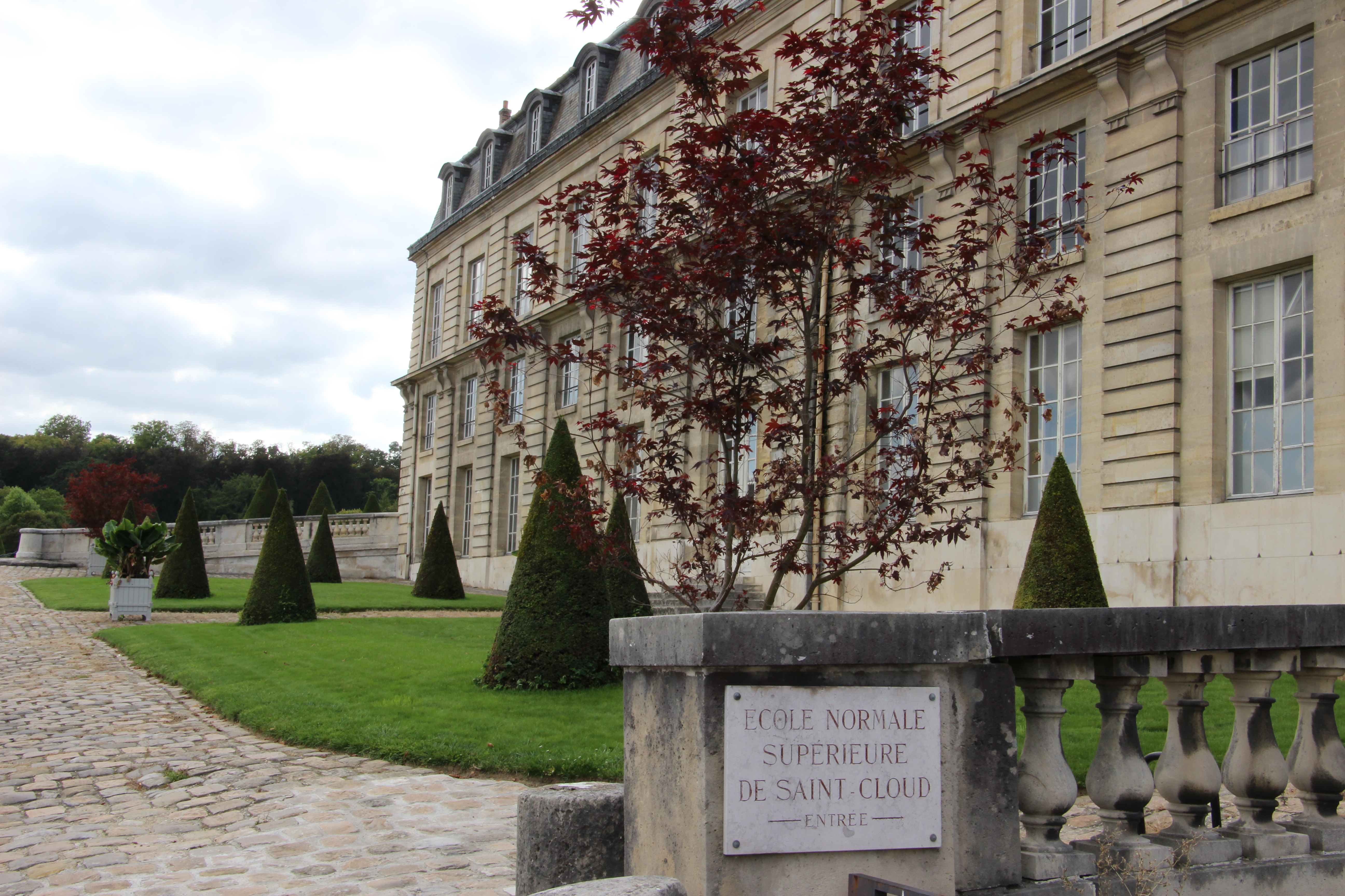 Bâtiment principal de l'ENS de Saint Cloud